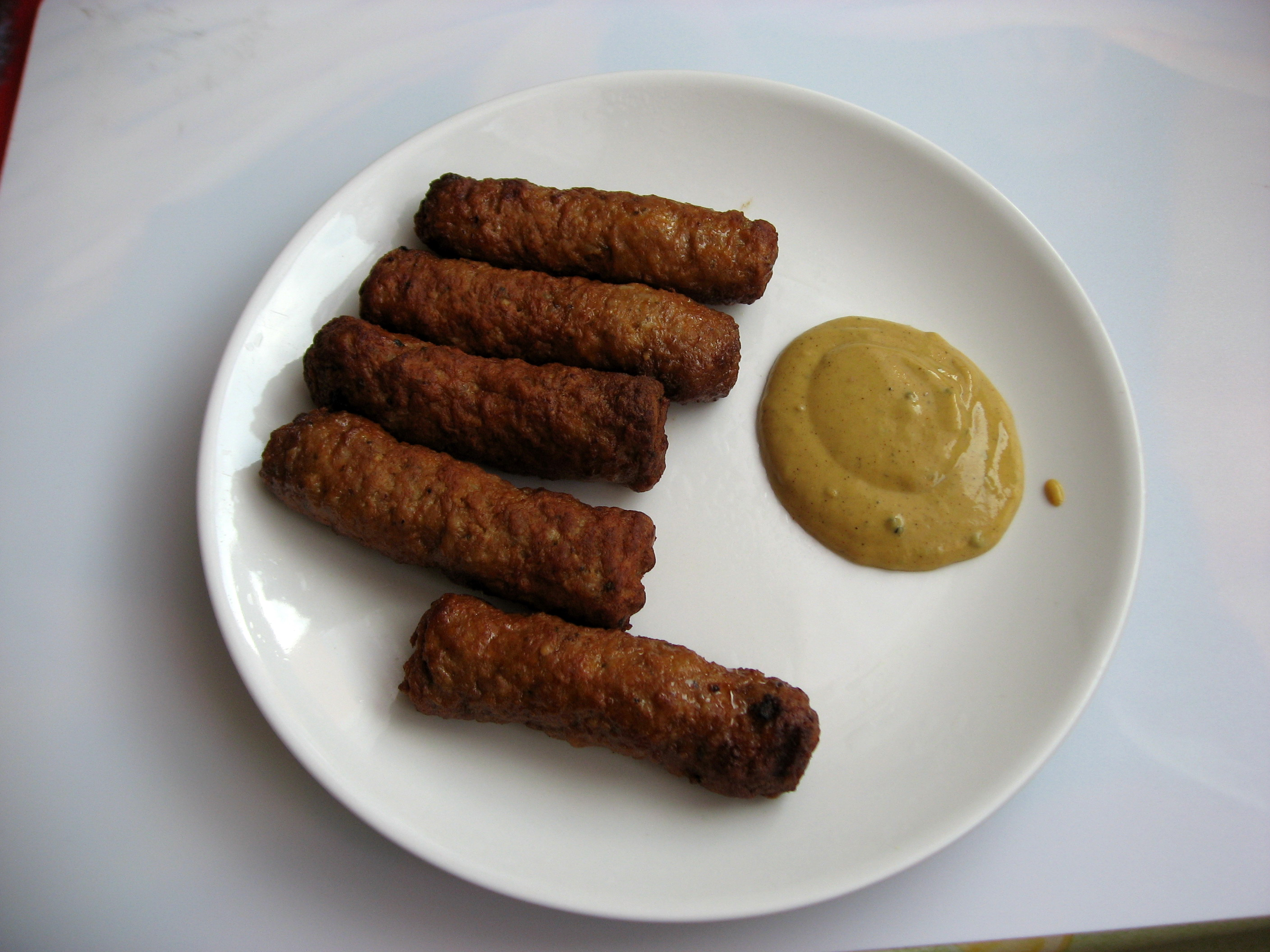 Čevabčiči s hořčicí